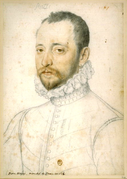 Portrait de Philippe Strozzi. Recueil. Portraits dessinés de la Cour de France, Bibliothèque nationale de France (BNF).